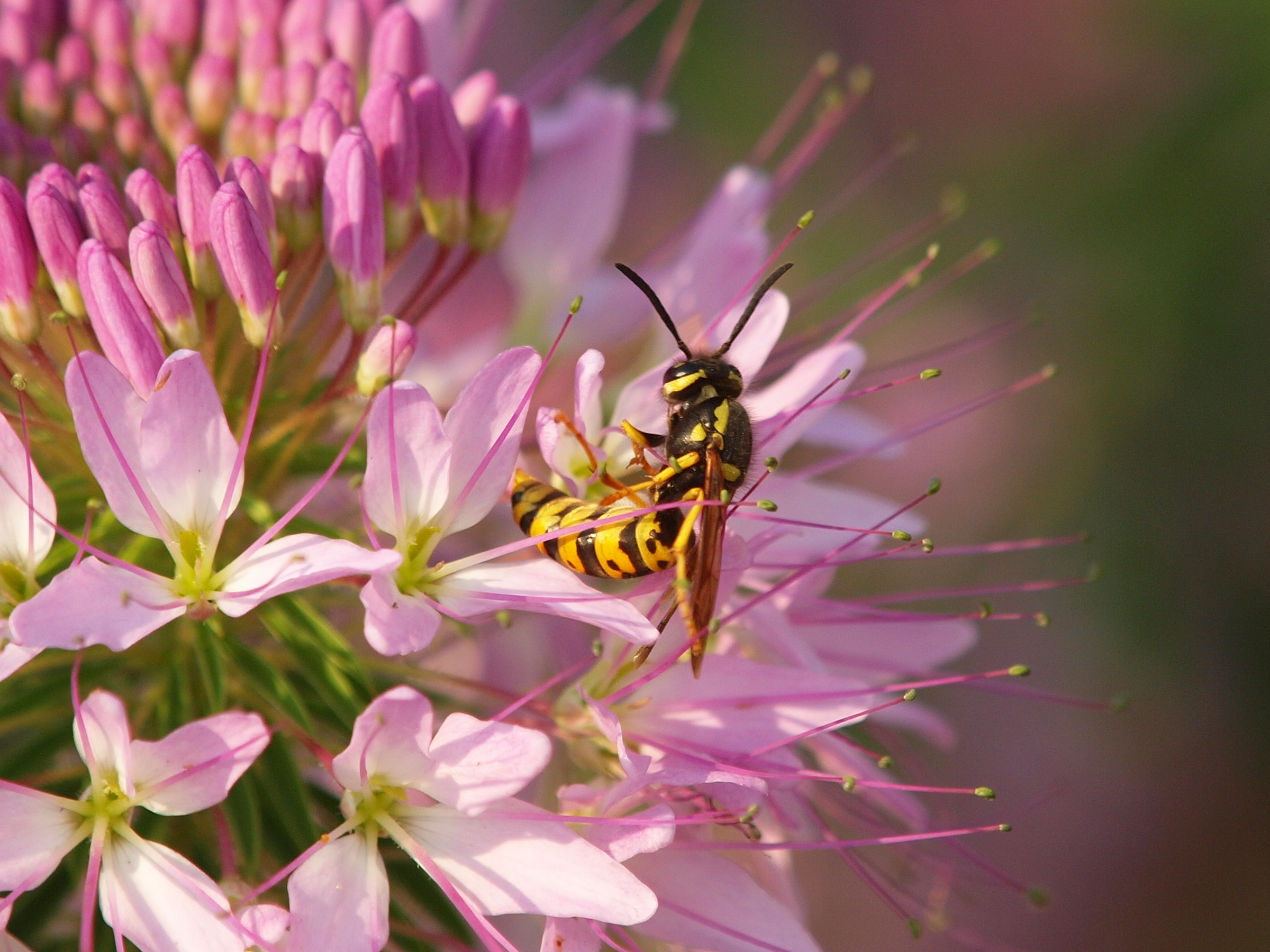 2012:08:17 17:13:54 (p8172444)